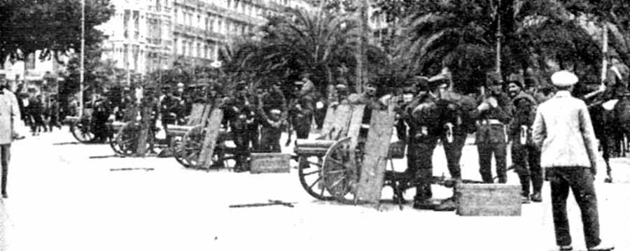 Cañones del Ejército español en la plaza de Cataluña de Barcelona durante la huelga general de 1917